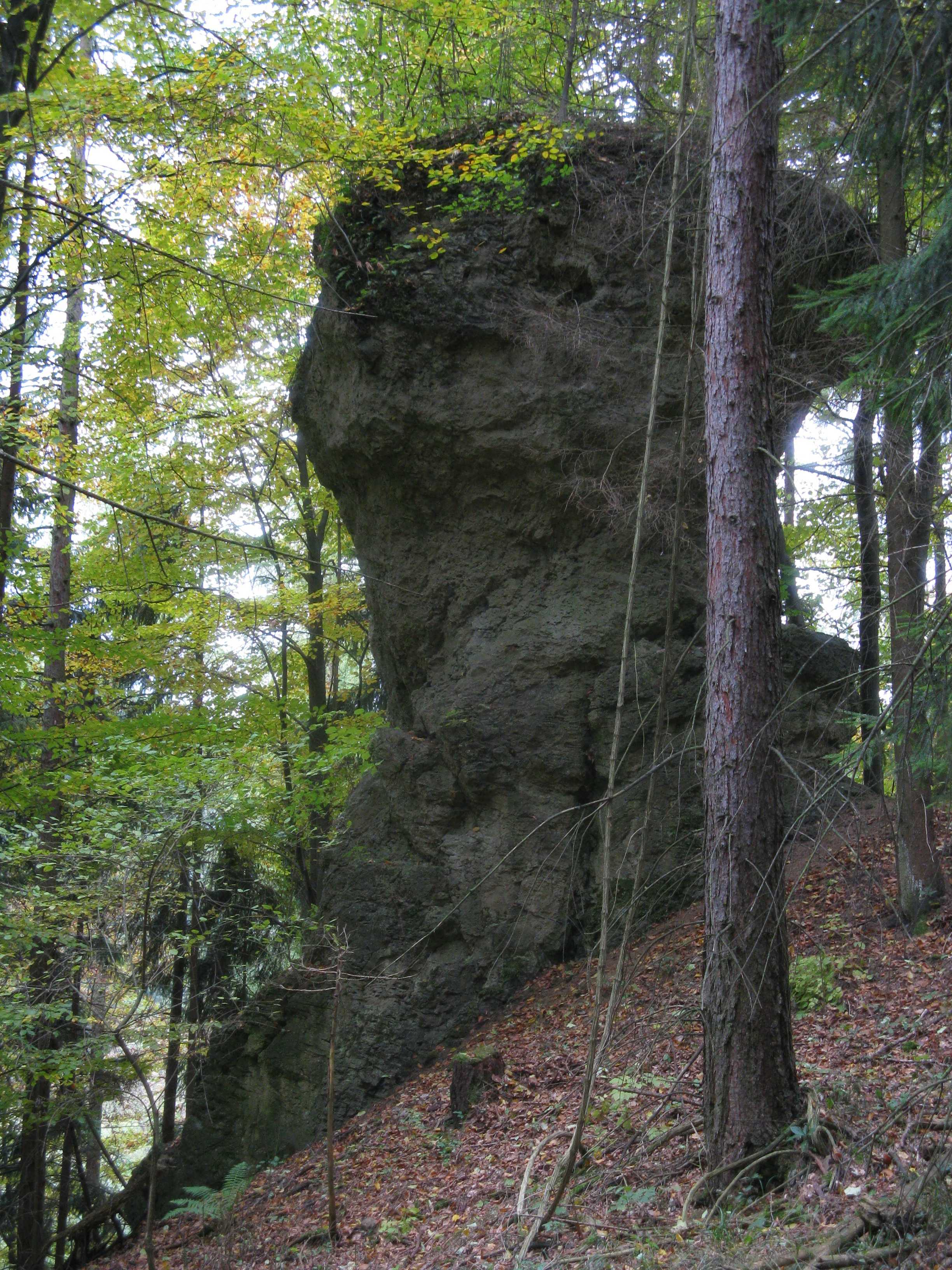 Dolomitfelsen am Knickelberg bei Herzberg am Harz